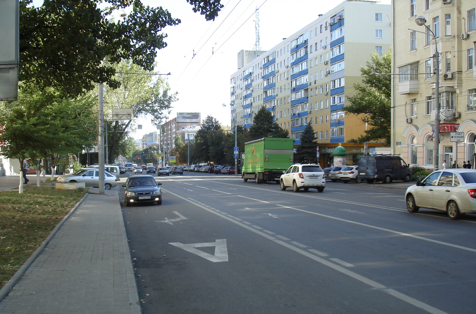 Вид на Ворошиловский проспект в сторону улицы Большой-Садовой